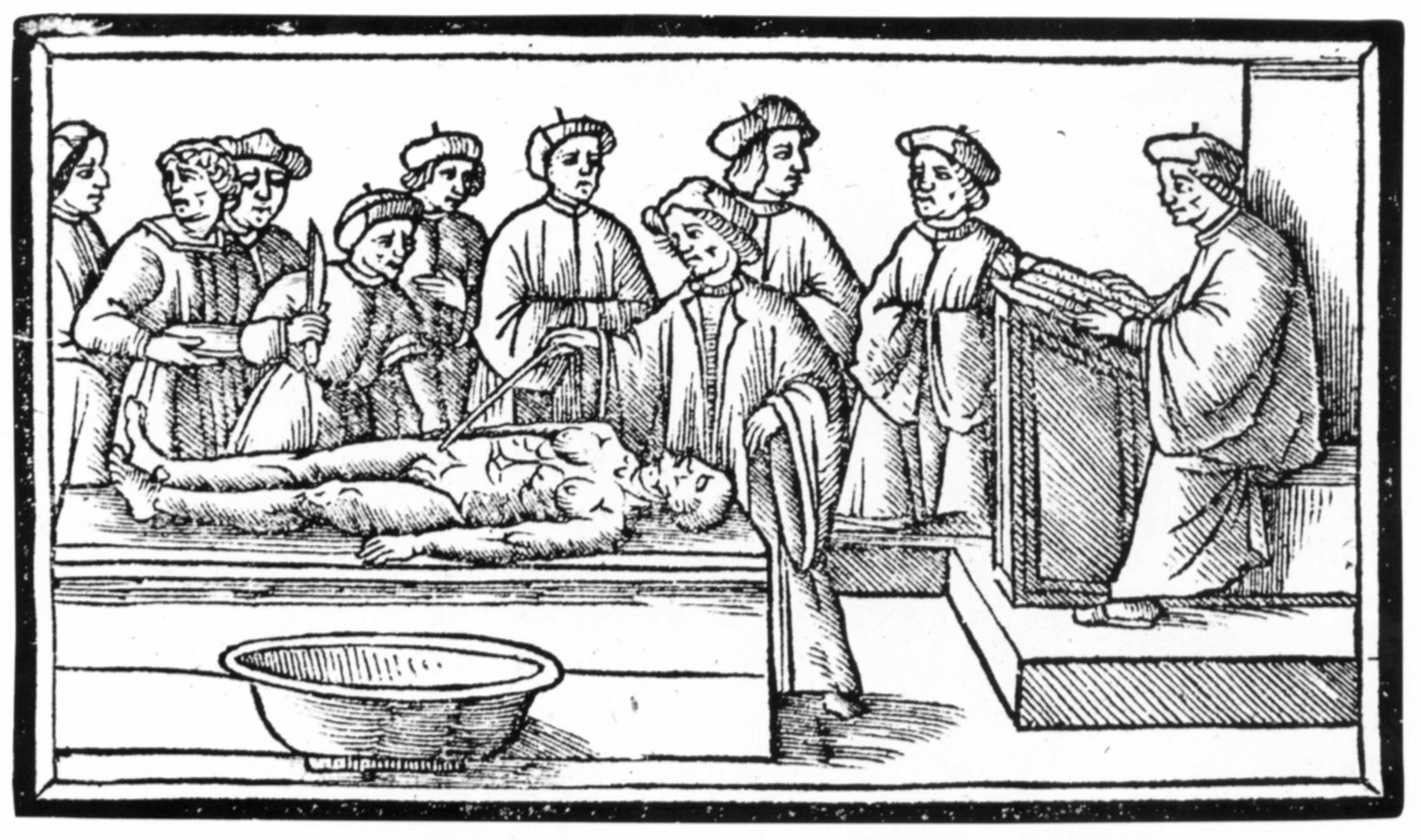 Jacopo Berengario da Carpi: Anatomia, Venedig 1535, Titelholzschnitt (Prädikantenbibliothek Isny)